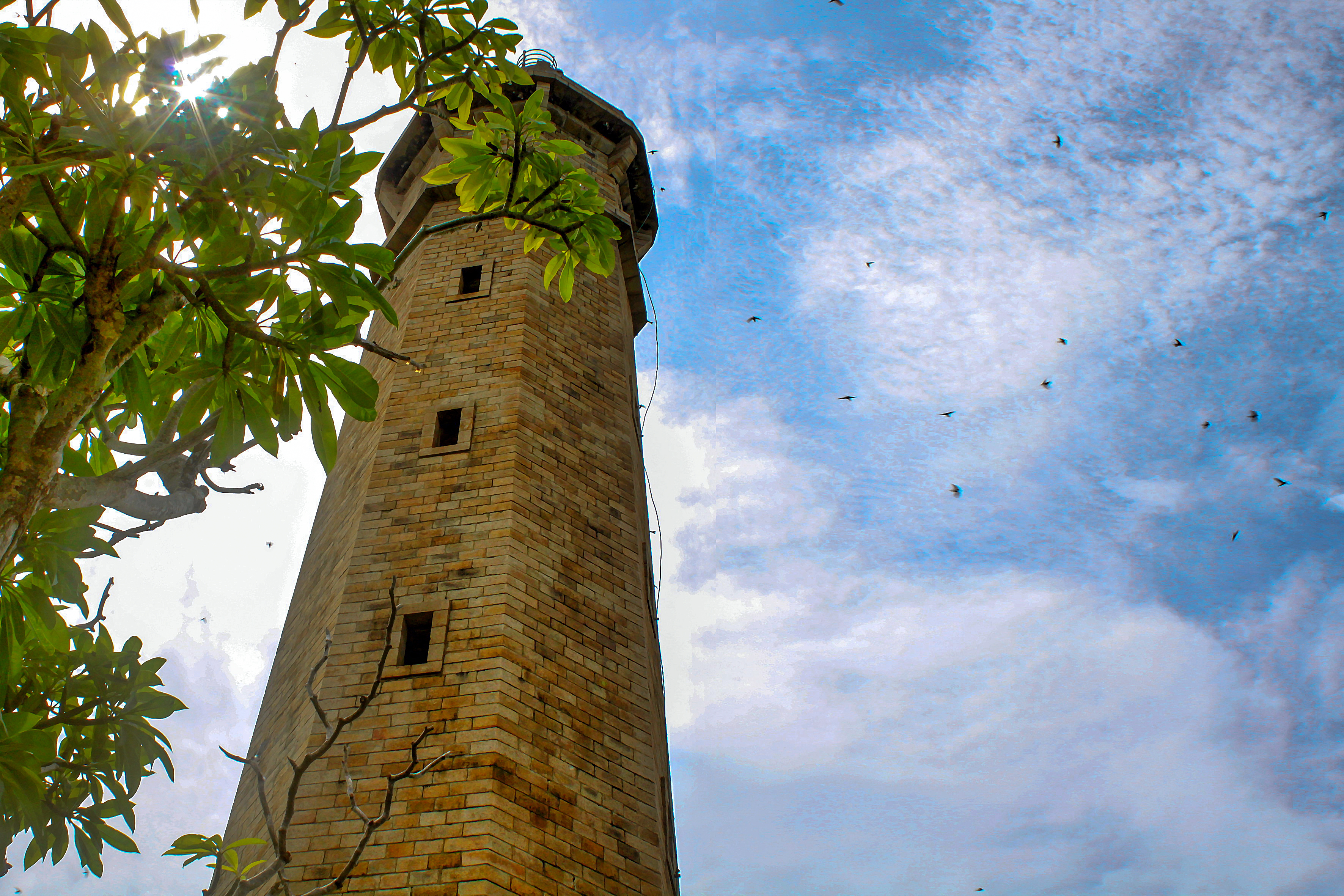 Ngọn hải đăng Kê Gà thuộc xã Tân Thành, huyện Hàm Thuận Nam, Bình Thuận, Việt Nam. Đây là hải đăng được trung tâm sách kỷ lục Việt Nam xác nhận là ngọn hải đăng cao nhất và cổ xưa nhất Việt Nam. thuộc xã Tân Thành, huyện Hàm Thuận Nam, Bình Thuận, Việt Nam. Đây là hải đăng được trung tâm sách kỷ lục Việt Nam xác nhận là ngọn hải đăng cao nhất và cổ xưa nhất Việt Nam.